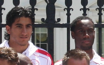 Araz Özbiliz & Vurnon Anita